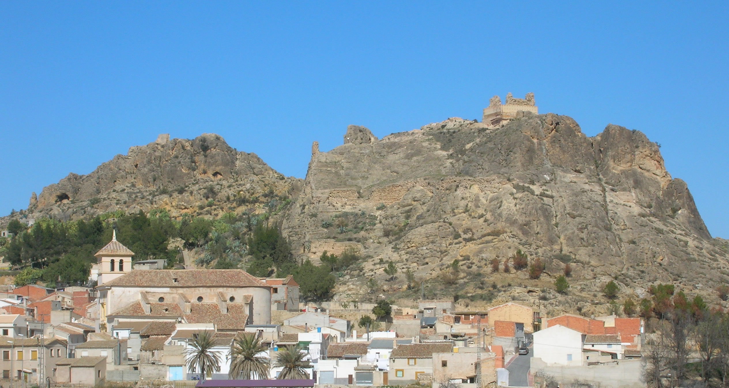 Vista parcial de la ciudad de Calasparra, Murcia, España, y vestigios del castillo árabe. Fotografía propia, cedida a PD.